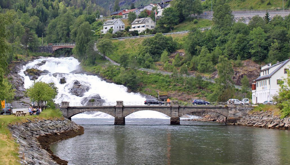 Hellesylt bru ved utløpet av Dalaelva med Hellesyltfossen i bakgrunnen.